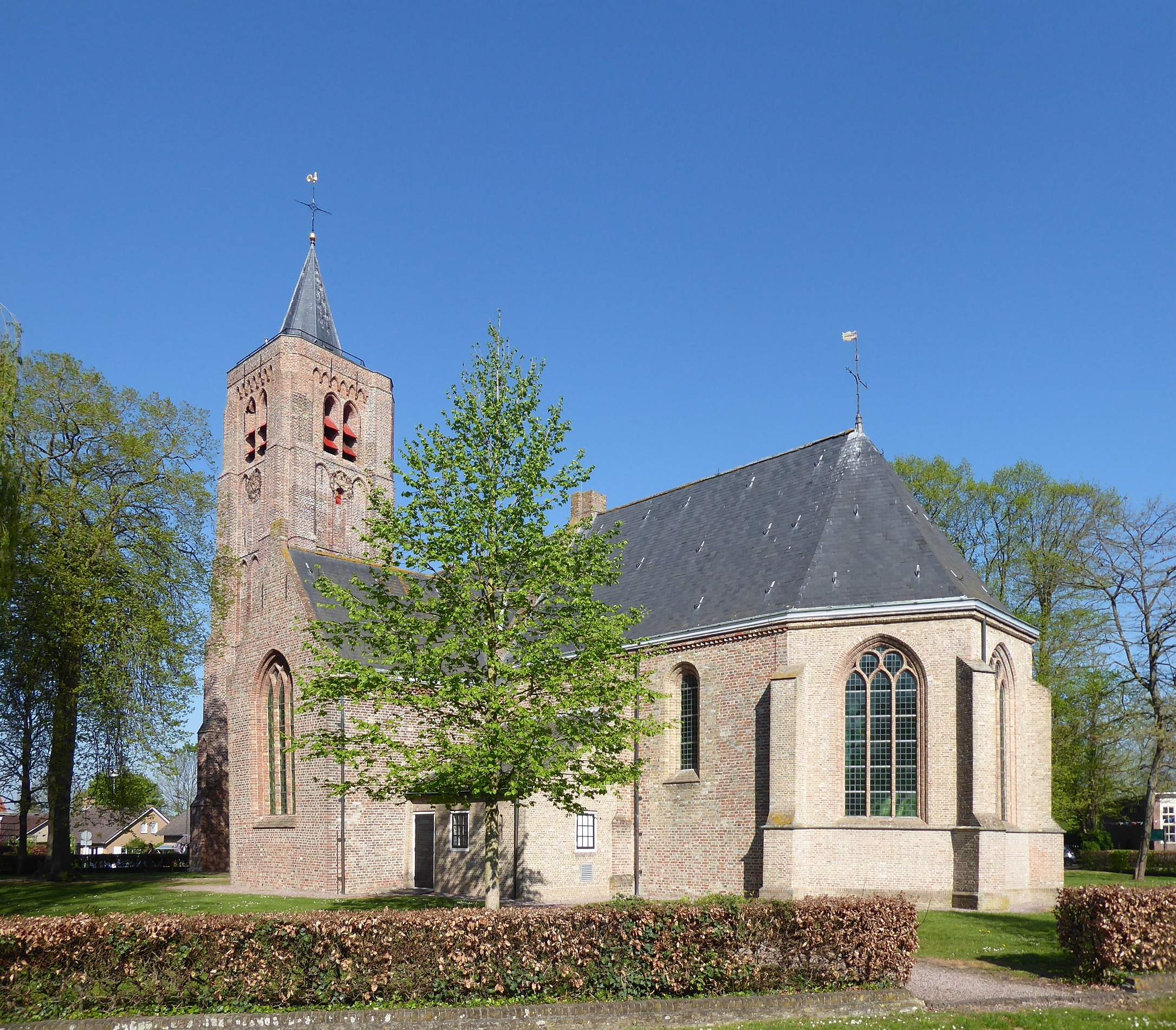 Kerk Johannes de Doper ('s-Heer Abtskerke)